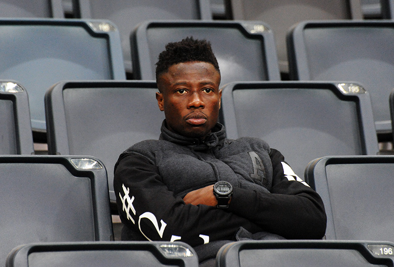 Ebenezer Ofori 2014-10-05 AIK vs MFF